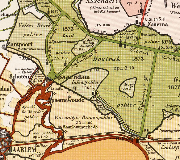 Houtrakpolder